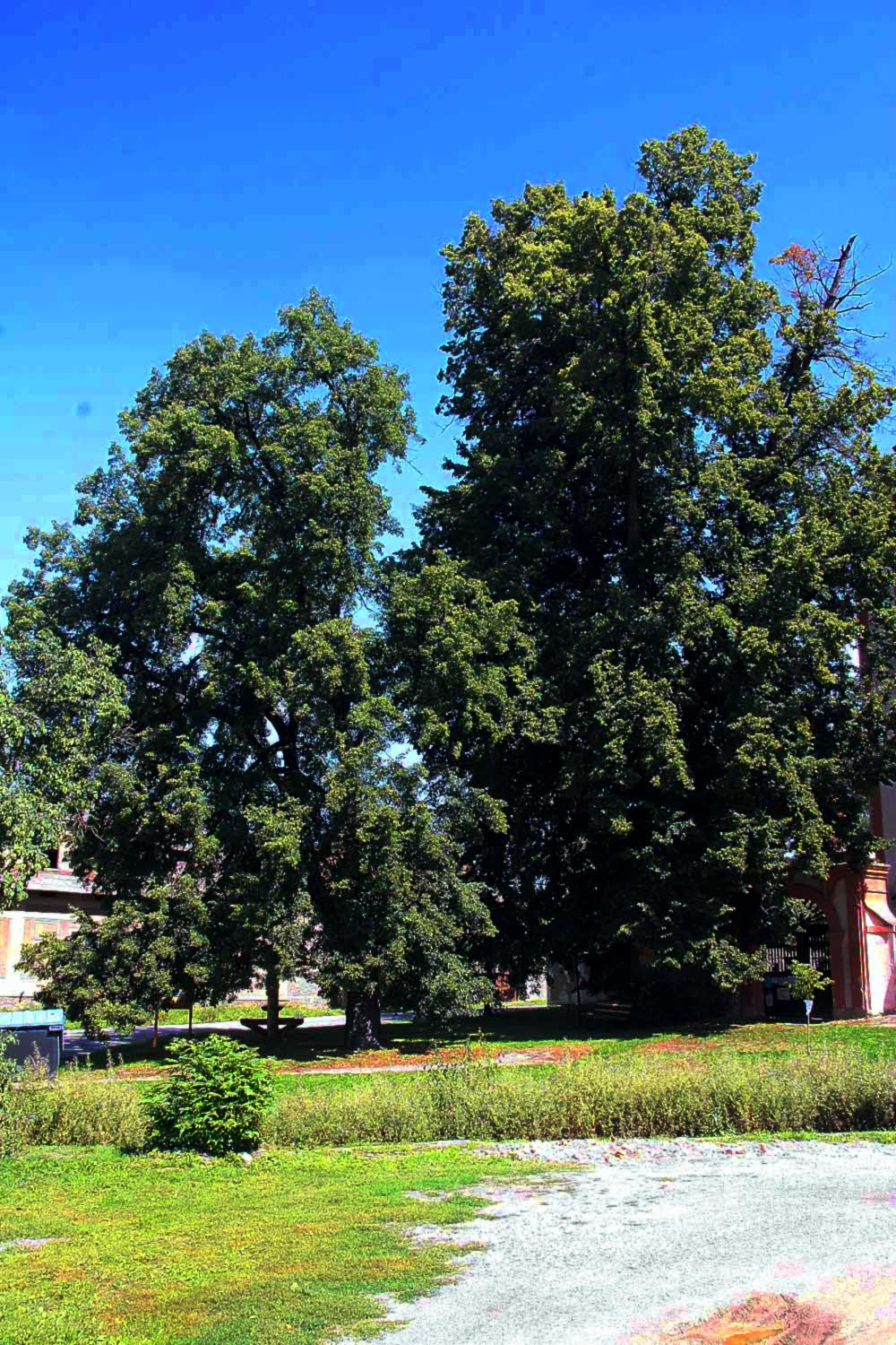 Památné lípy u kostela sv. Stanislava v Mořině, okres Beroun